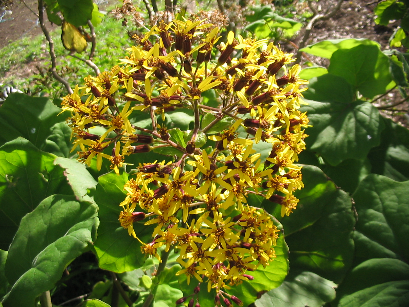 Pestwurzblättriges Greiskraut (Roldana petasitis) - Blüte